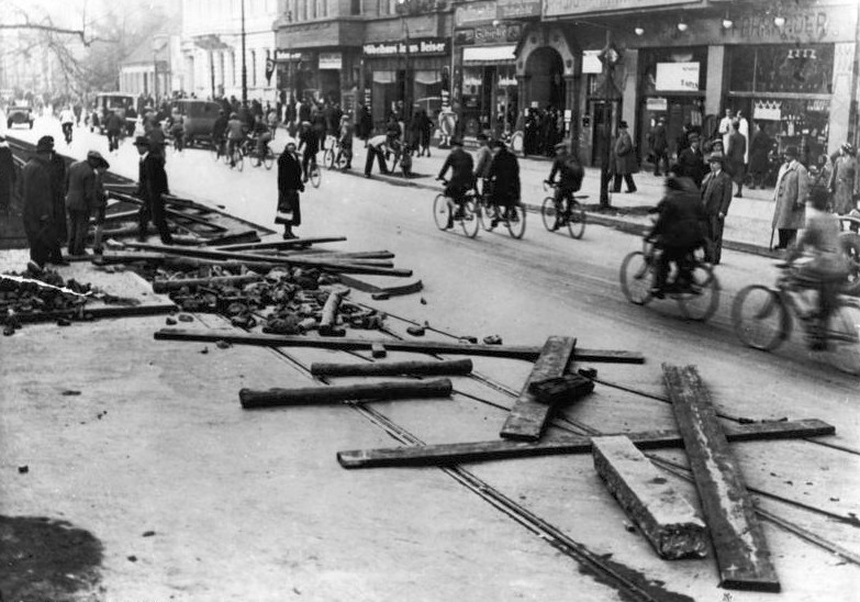 Berlin-Schöneberg, BVG-Streik ADN-ZB Streik der Berliner Verkehrsbetriebe (BVG-Streik) vom 3.-7.11.1932 Rund 22.000 Arbeiter der BVG beantworten die Ankündigung eines weiteren Lohnabbaus mit einem Streik, der nahezu den gesamten Verkehr der Stadt lahmlegt. UBz: Hindernisse auf den Straßenbahnschienen in der Hauptstadt in Berlin-Schöneberg, um das Fahren von Streikbrechern gefahrener Straßenbahnen zu verhindern